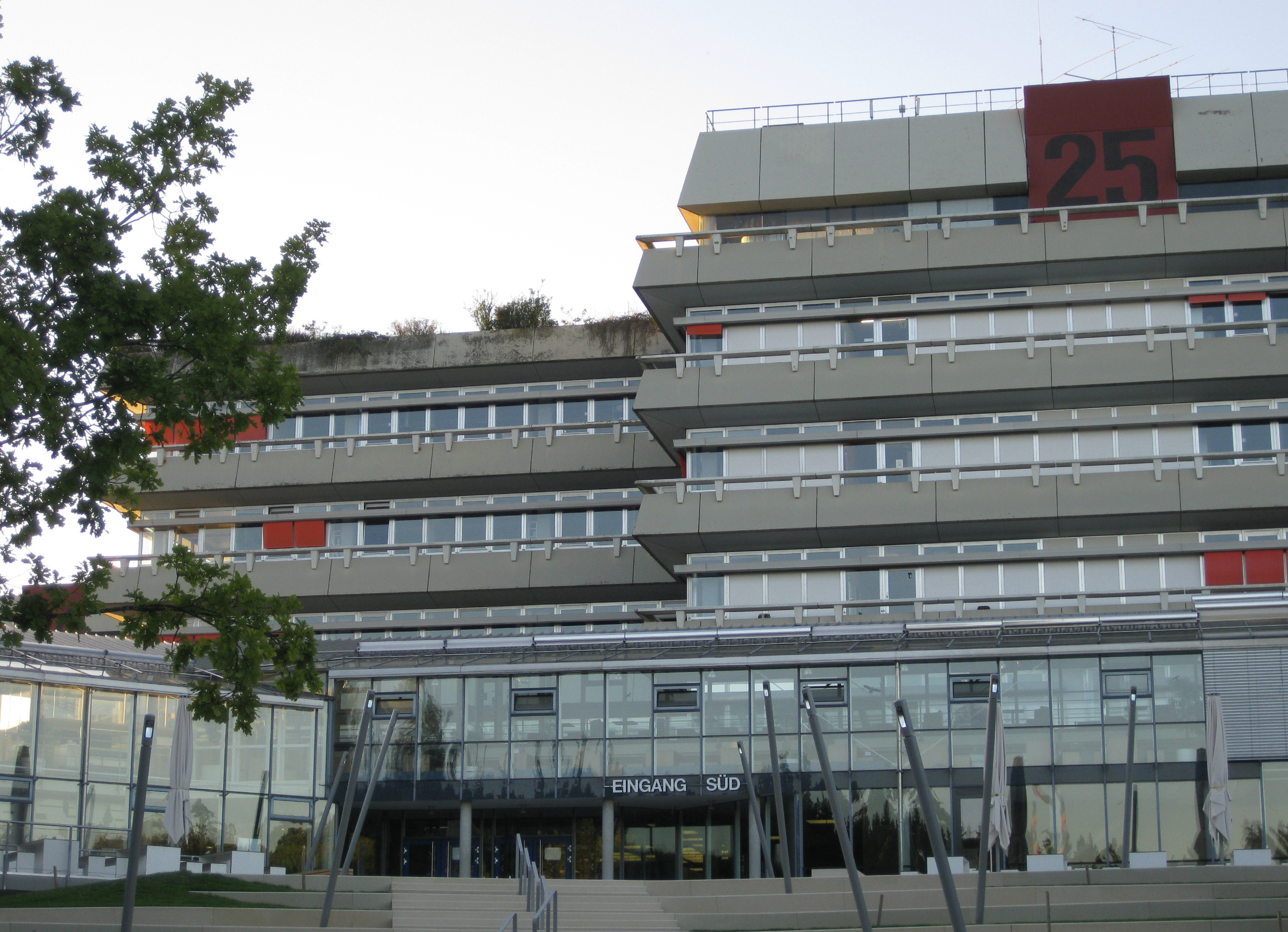 Eingangsbereich (Süd) der Universität Ulm, Albert-Einstein-Allee, Ulm